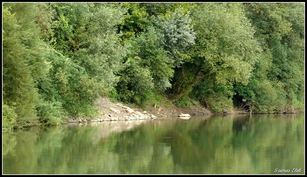 Olcsvaapáti, Hungary